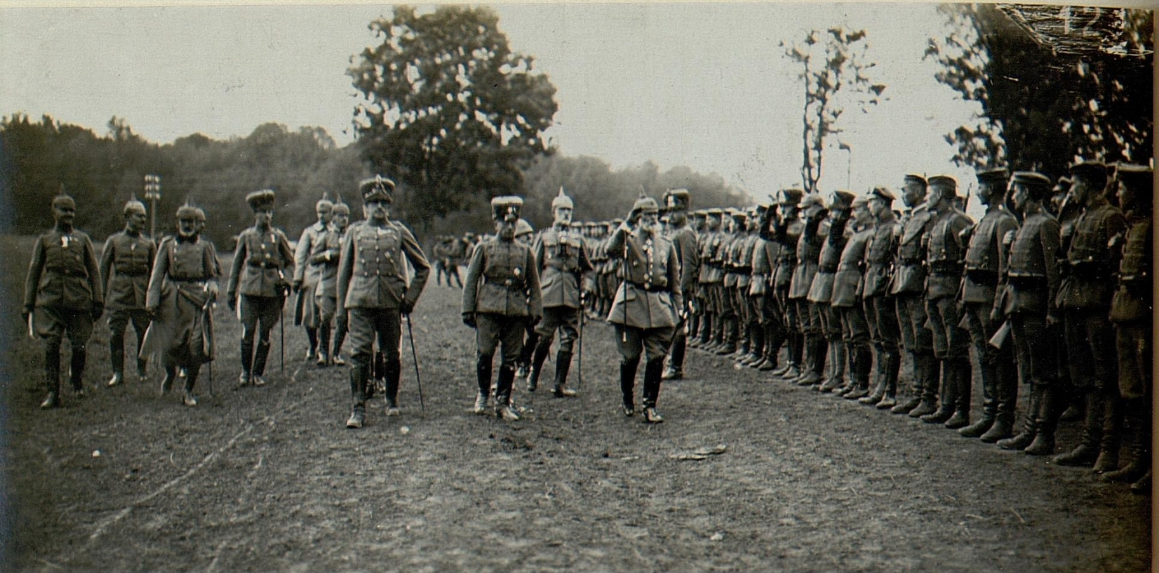 Inspizierung durch Se.kgl.Hoheit Prinz Leopold.v.Bayern